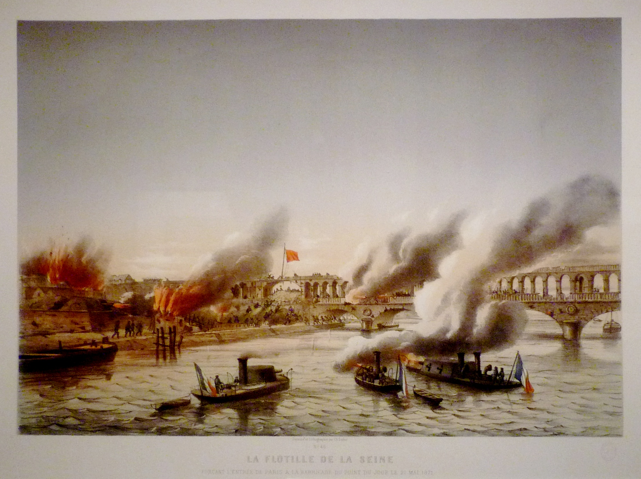 Exposition La Commune de Paris à l'Hôtel de Ville de Paris (18 mars - 28 mai 2011) - 21 mai : les versaillais pénètrent dans Paris par le bastion du Point-du-Jour à la porte de Saint-Cloud - Lithographie de Charles Leduc - Musée Carnavalet.